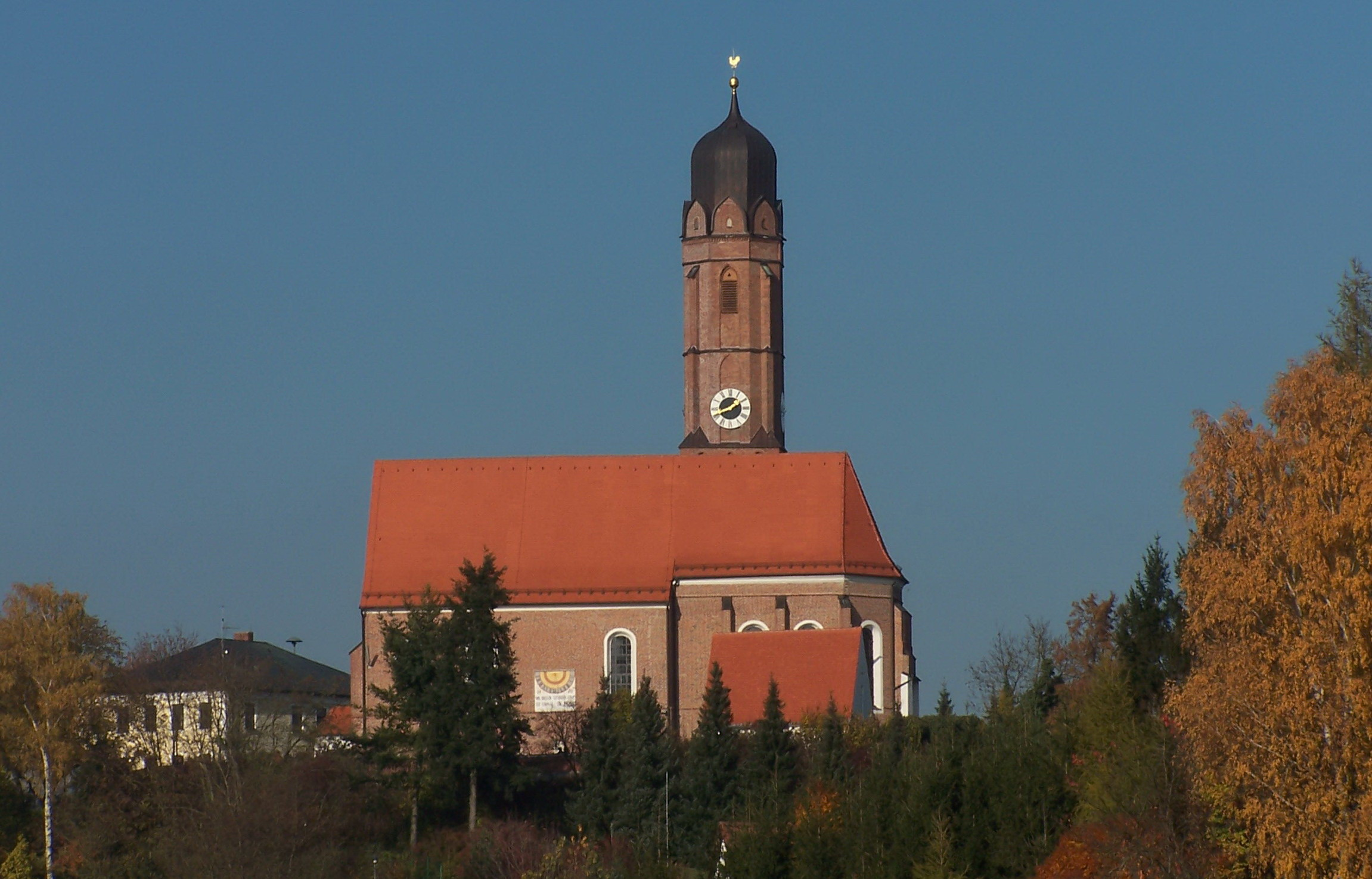 Pürkwang, Pfarrkirche St. Andreas